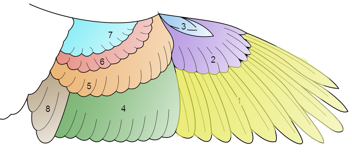 Перья крыла птицы (на рисунке): 1 — маховые перья 1-го порядка; 2 — большие кроющие перья; 3 — крылышко; 4, 8 — маховые перья 2-го порядка; 5 — оперение плеча; 6 — средние кроющие перья; 7 — кроющие перья крыла.